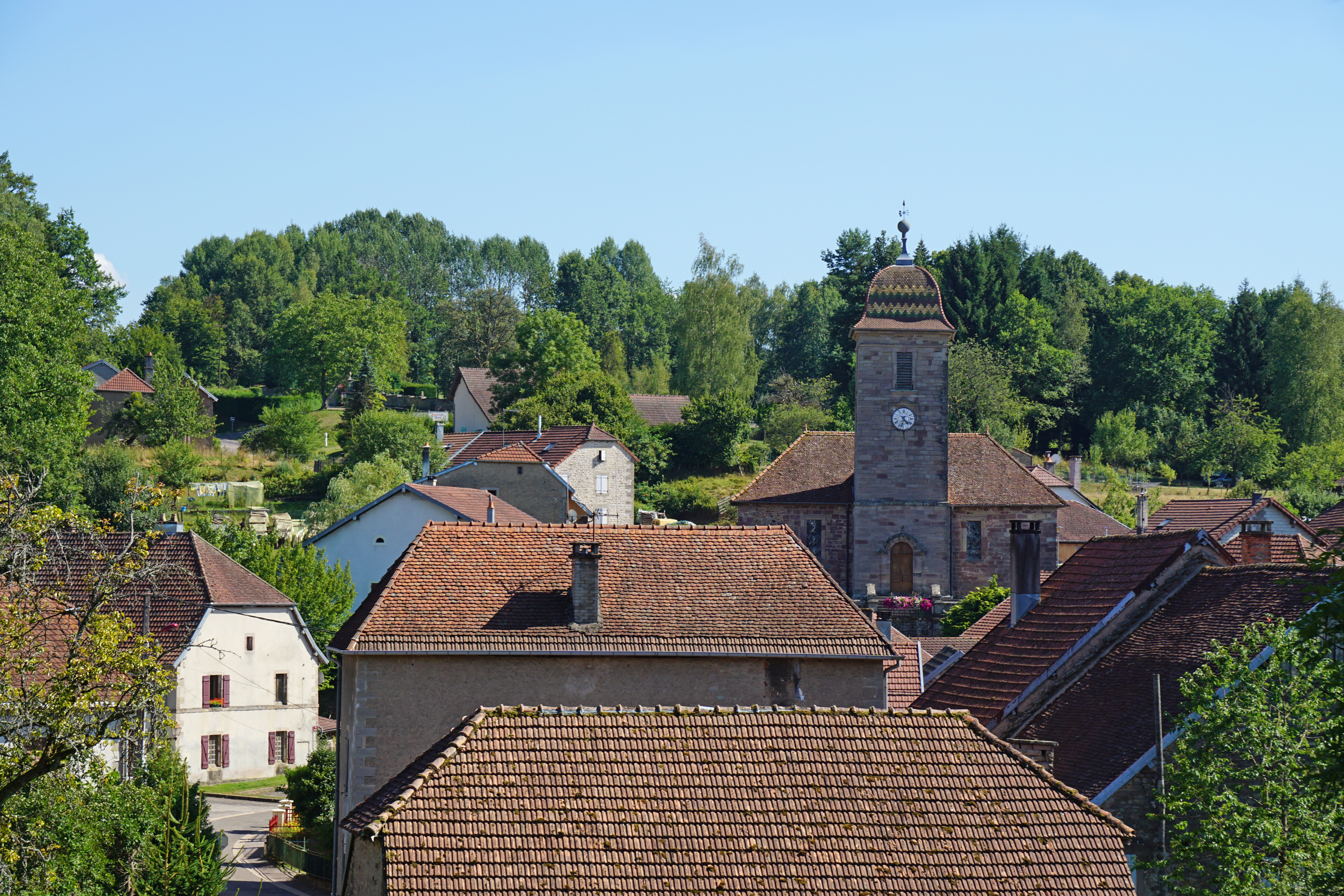 Clairegoutte.